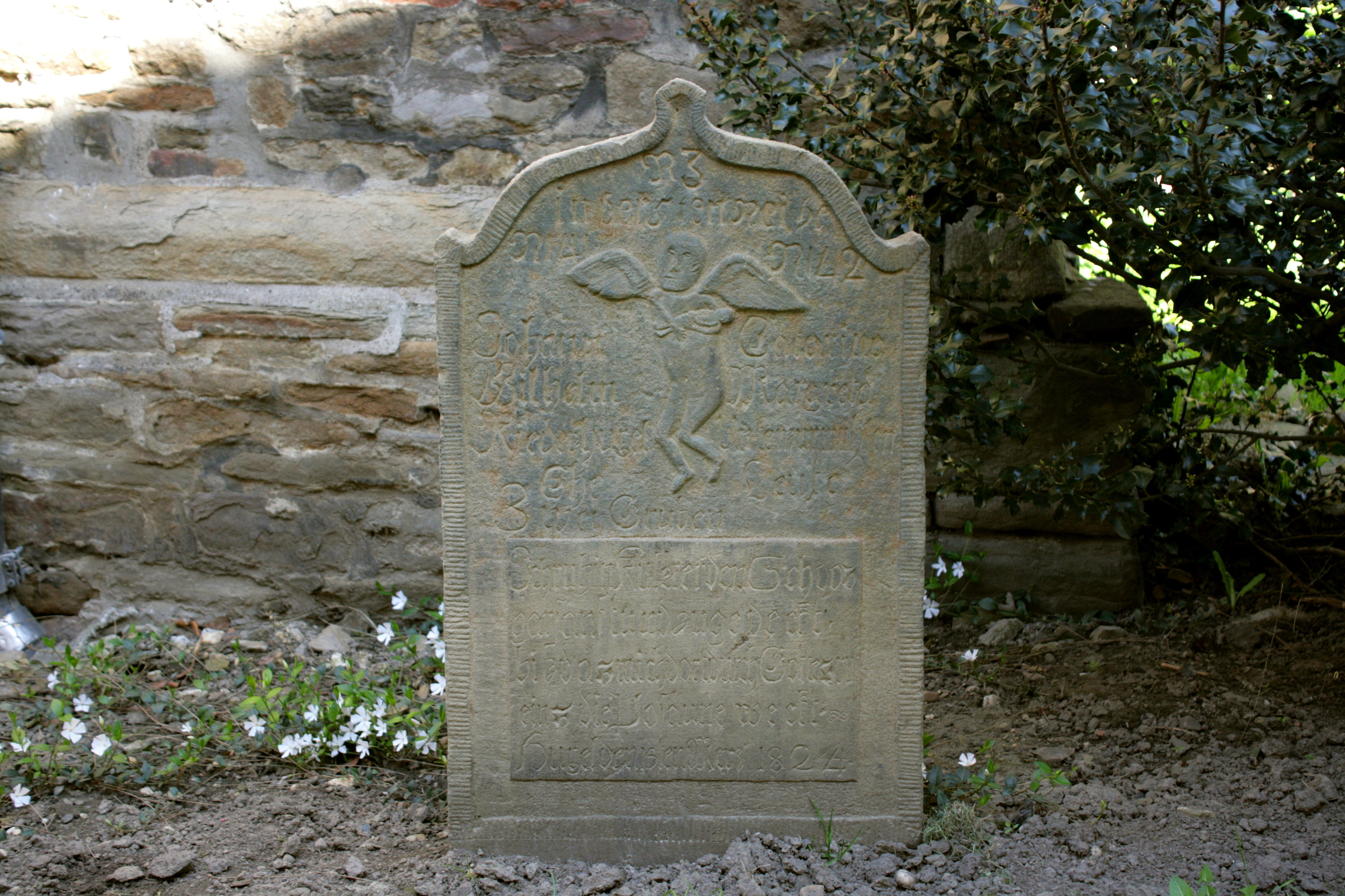 Evangelische St.-Georgs-Kirche auf dem Kirchplatz in Hattingen